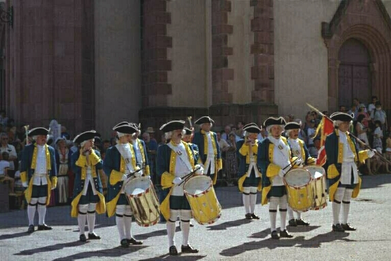 Relève de la garde à Senones Réminiscence de la principauté de Salm. Photographie personnelle du 9 août 1998.